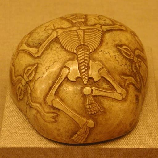 嘎巴拉碗 User:Mountainzh:2004年zh:7月28日拍摄于zh:北京大学zh:赛克勒考古与艺术博物馆。拍摄者已授权将该图片置于zh:公共领域。 本物原为台湾收藏家zh:王度所藏，于北京大学赛克勒考古与艺术博物馆临时展出。拍摄者已授权依照GFDL协议发布该图像。